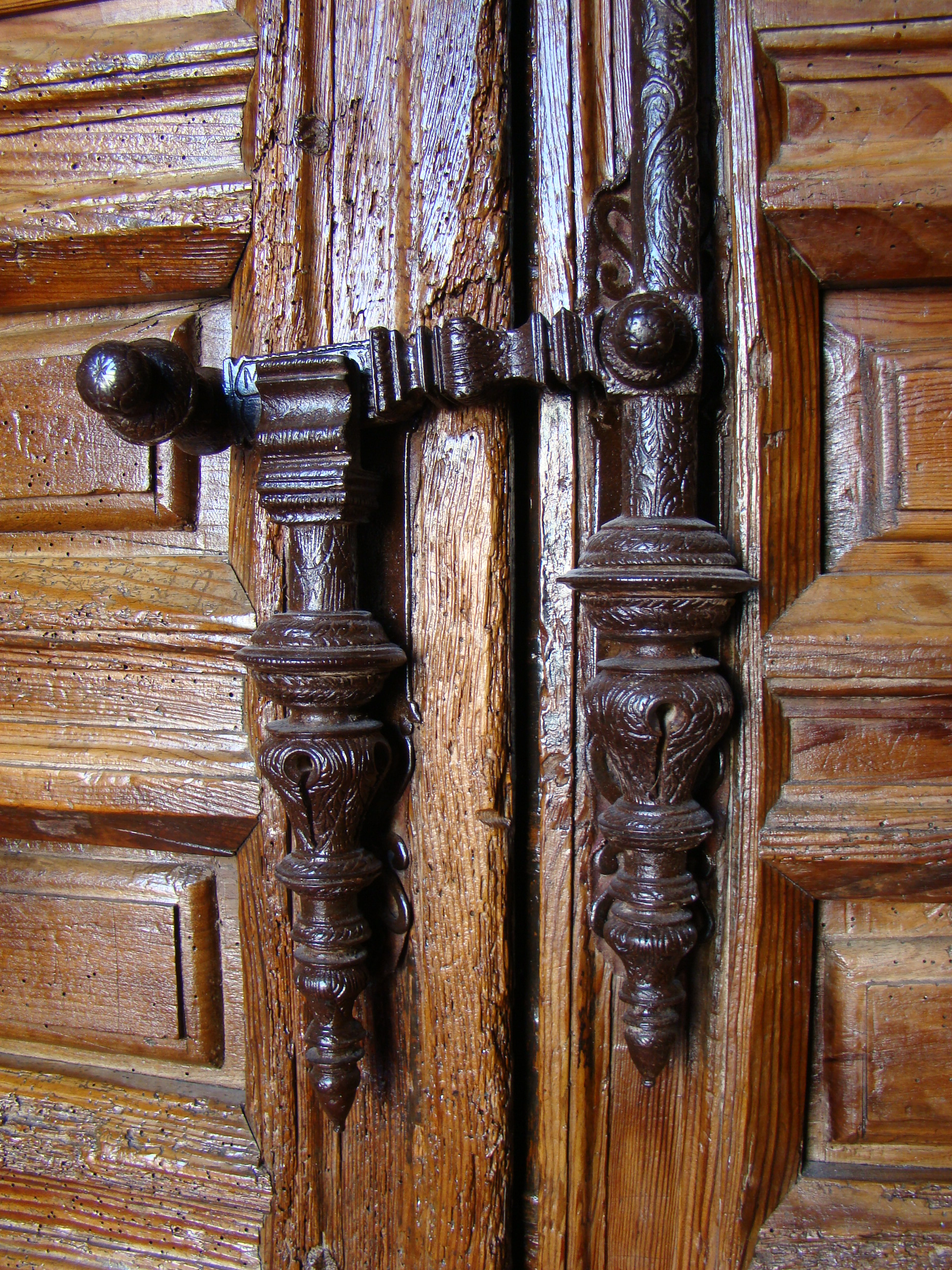 Iglesia de San Juan Bautista en la localidad de Arrabal de Portillo (Valladolid, España). La cancela de la puerta conserva la cerraja firmada por Manuel Domínguez en 1736.